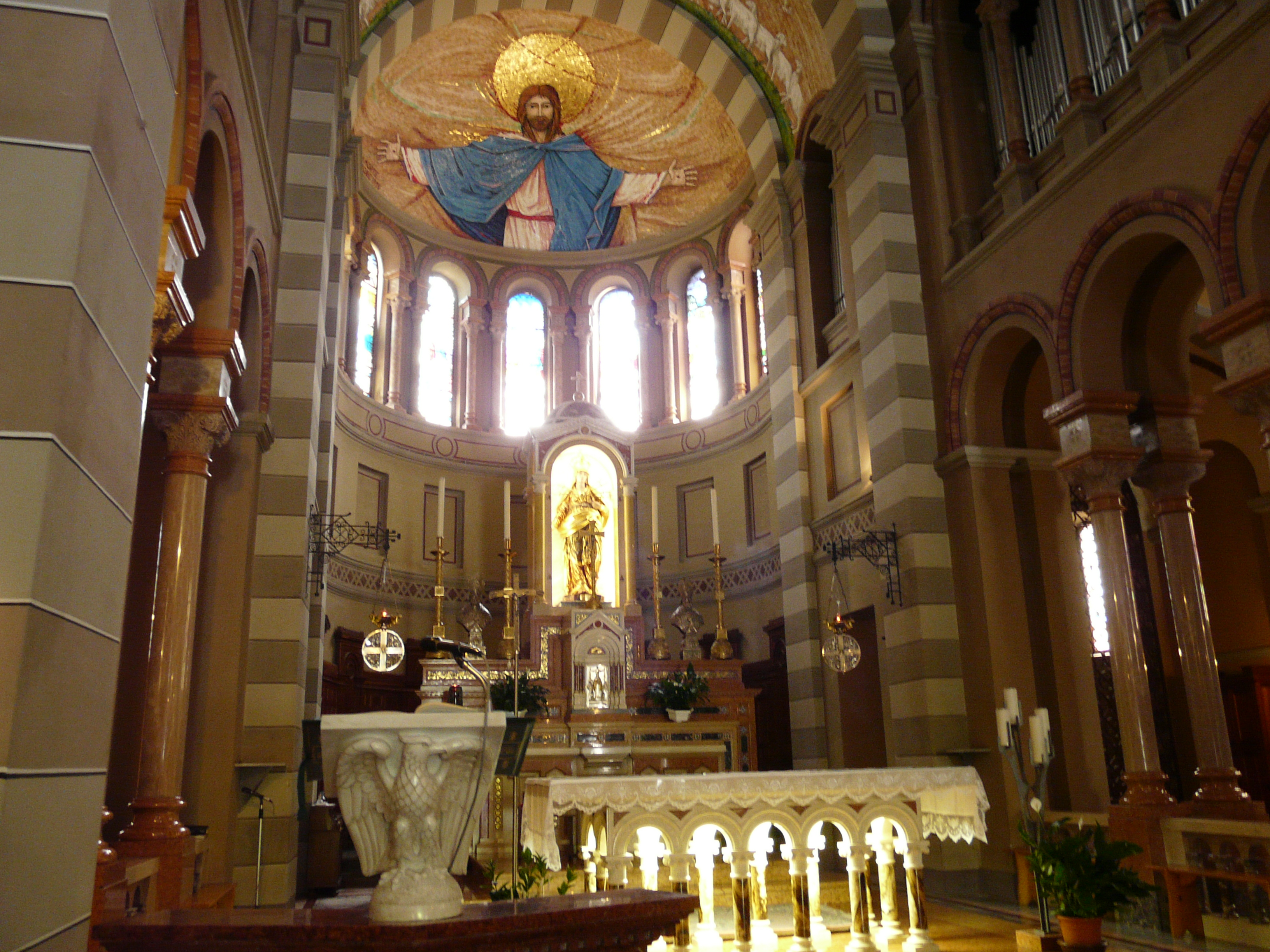 Chiesa di Santa Maria Addolorata di Bardi, Emilia-Romagna, Italia